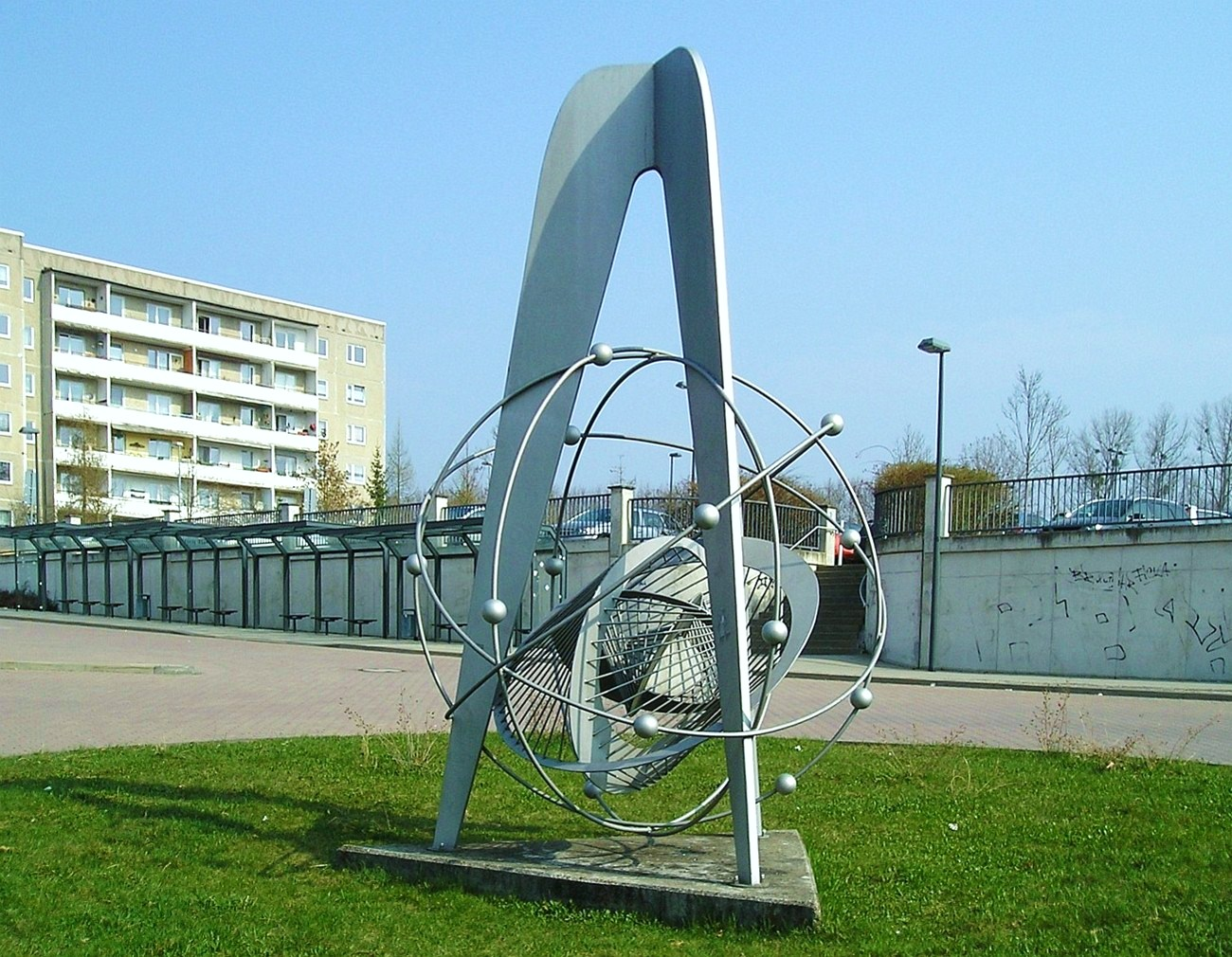 Die Plastik Atomium stand als Symbol einst vor dem Haupttor von Robotron Meiningen, einem Hersteller von Halbleiterprodukten und Kleincomputern, heutiger Standort ist der Obertshäuser Platz am Landratsamt.